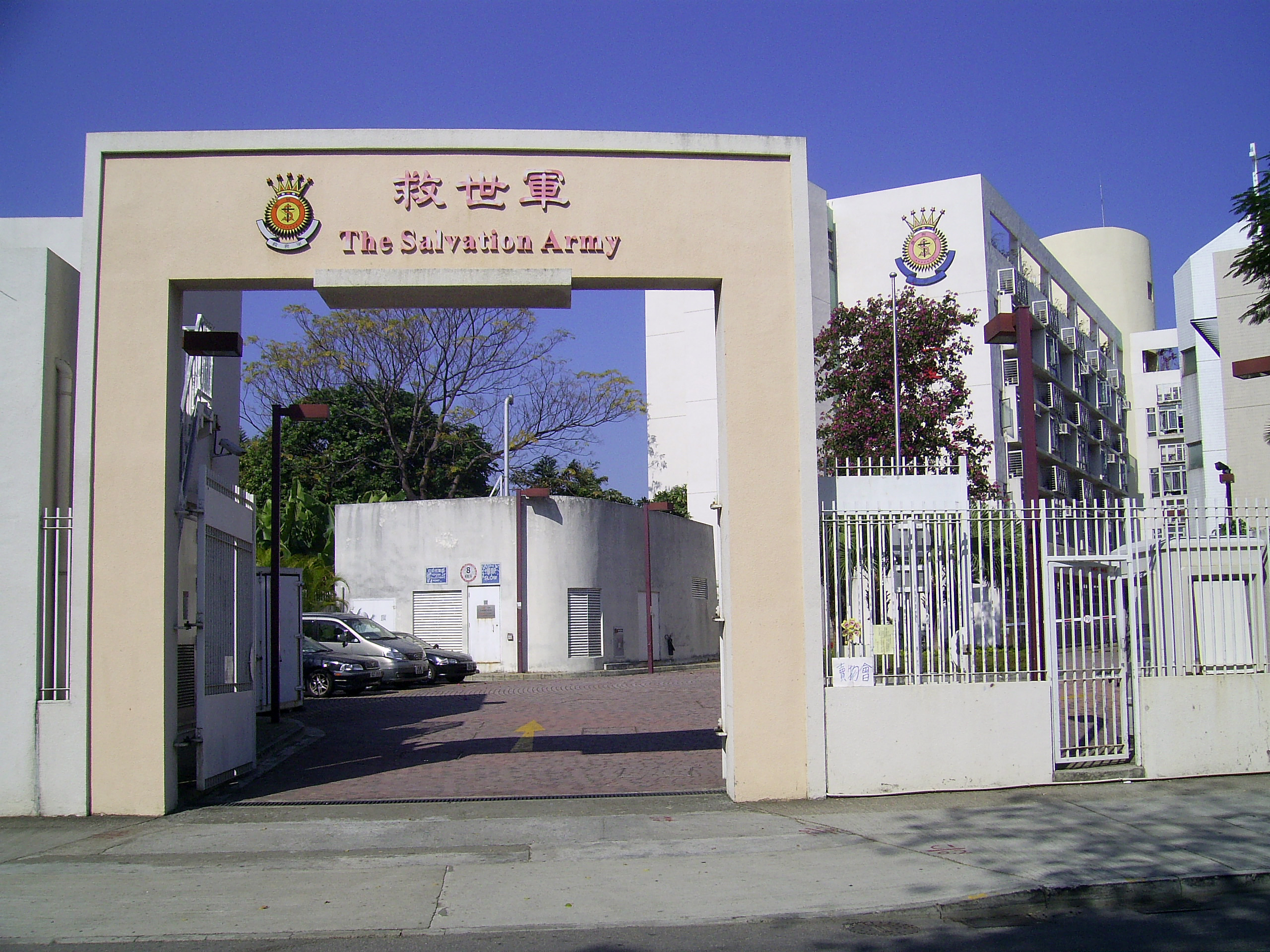 中文（香港）: 救世軍錦田隊